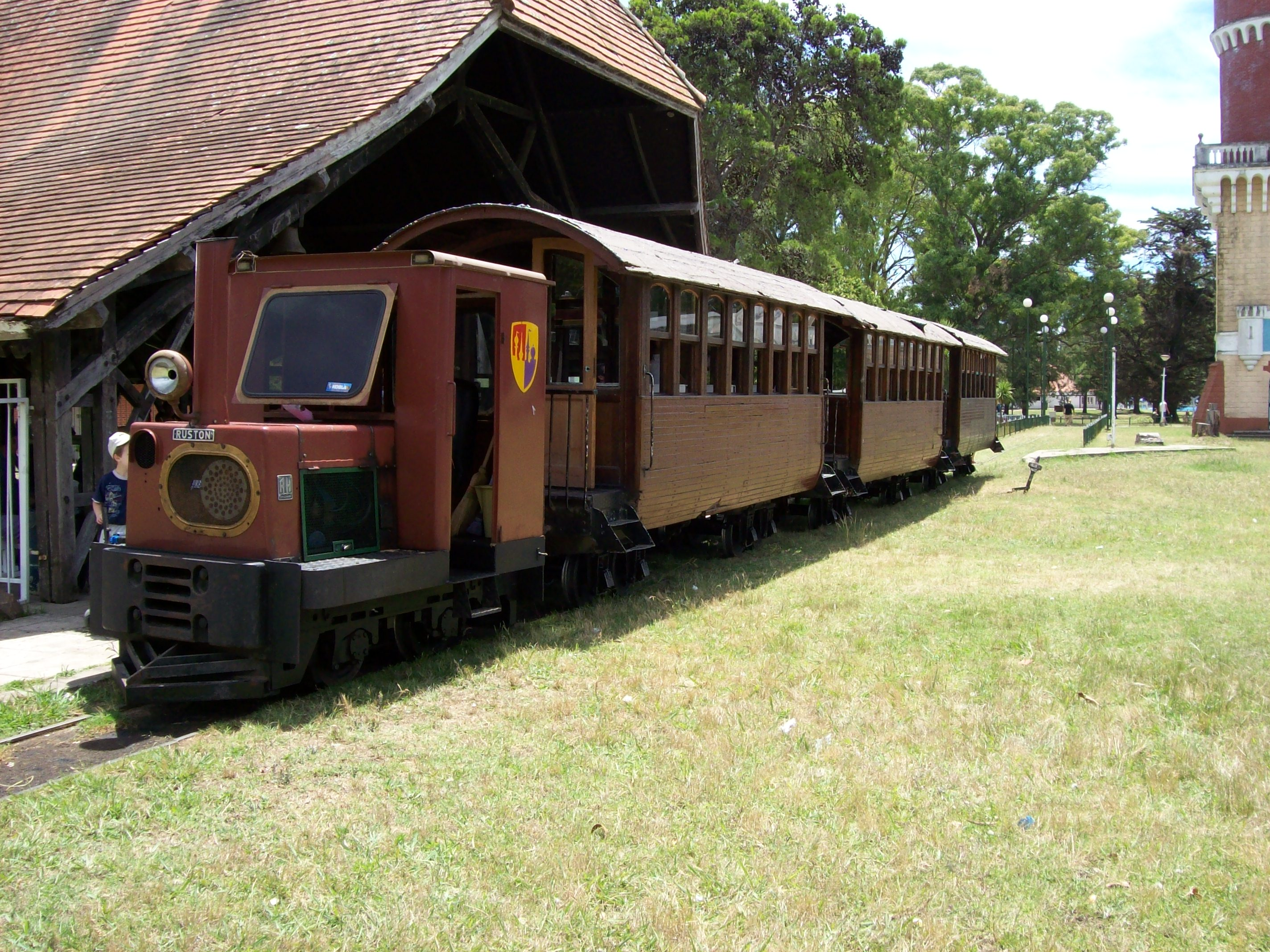 Trencito que recorre la República de los Niños en la estación terminal. Ubicado en Gonnet, partido de la Plata, Provincia de Buenos Aires, Argentina.